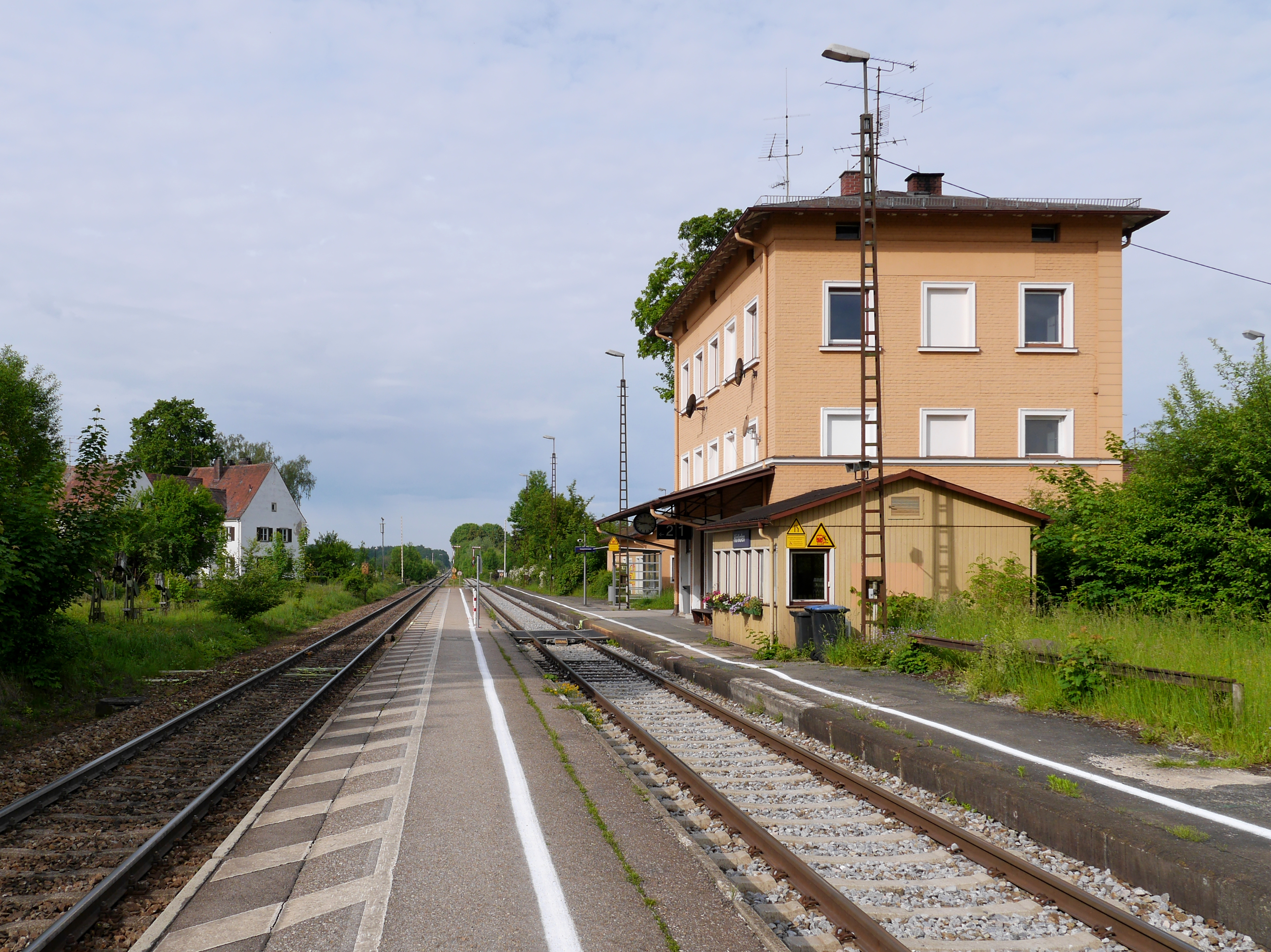 Bahnsteige und Empfangsgebäude des Bahnhofs Hörlkofen, Ansicht von Nordosten